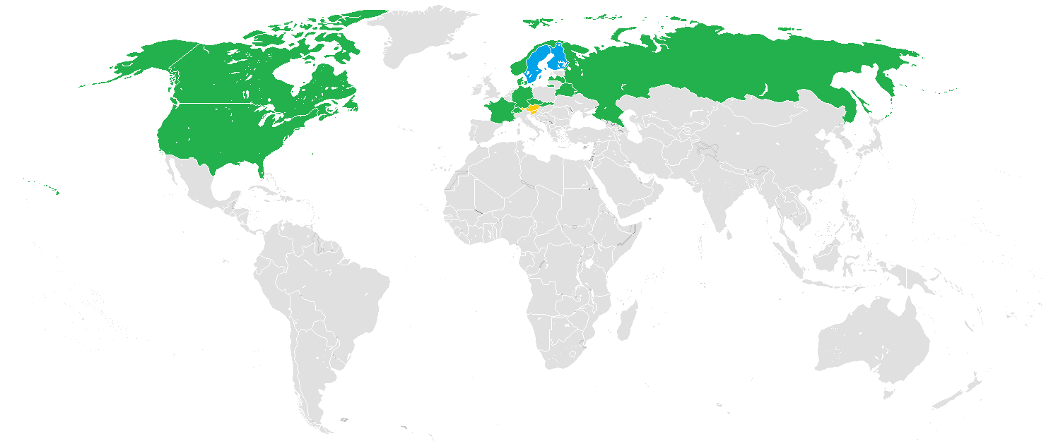 Карта участников ЧМ-2013 по хоккею с шайбой